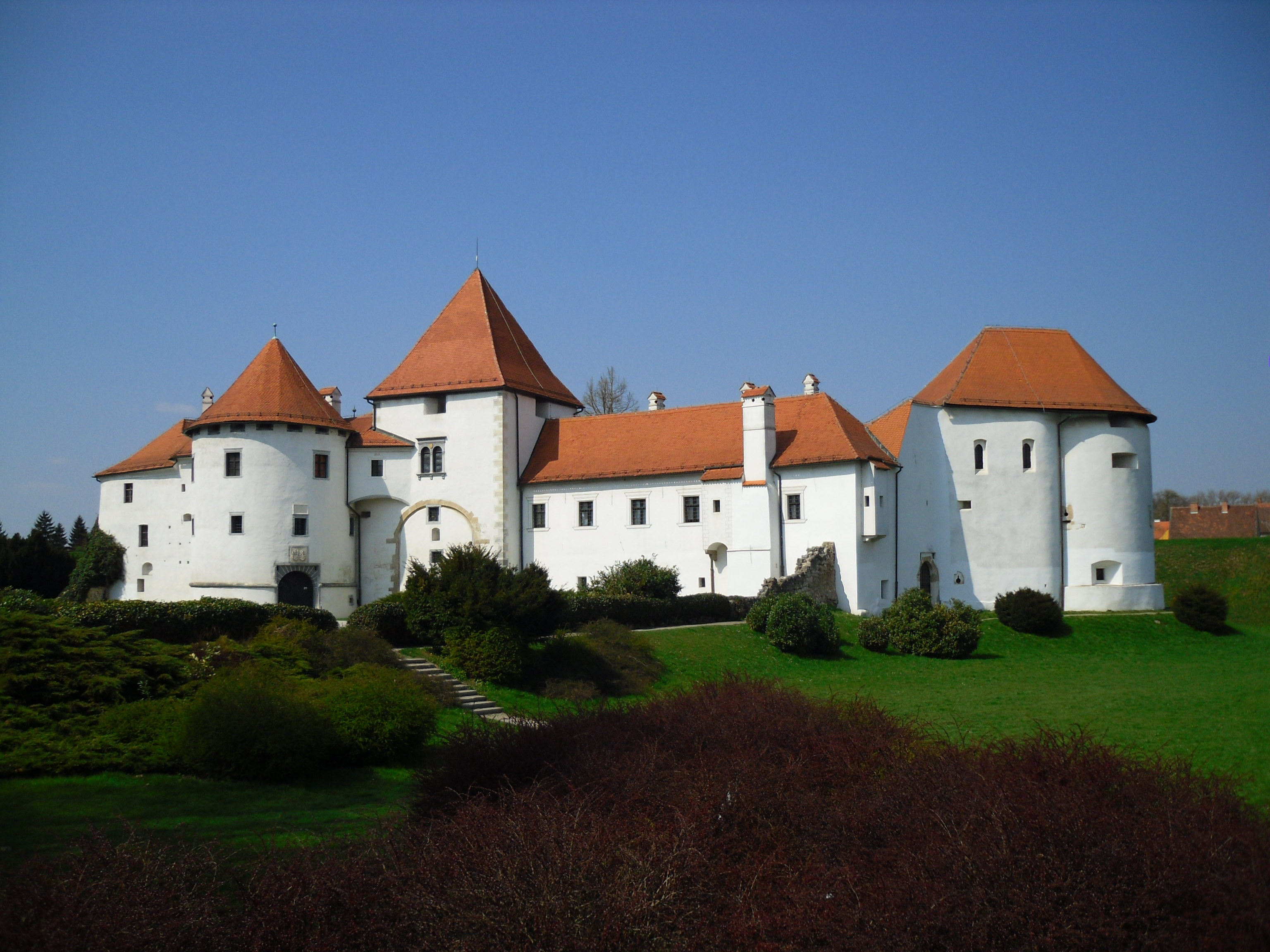 Varaždin